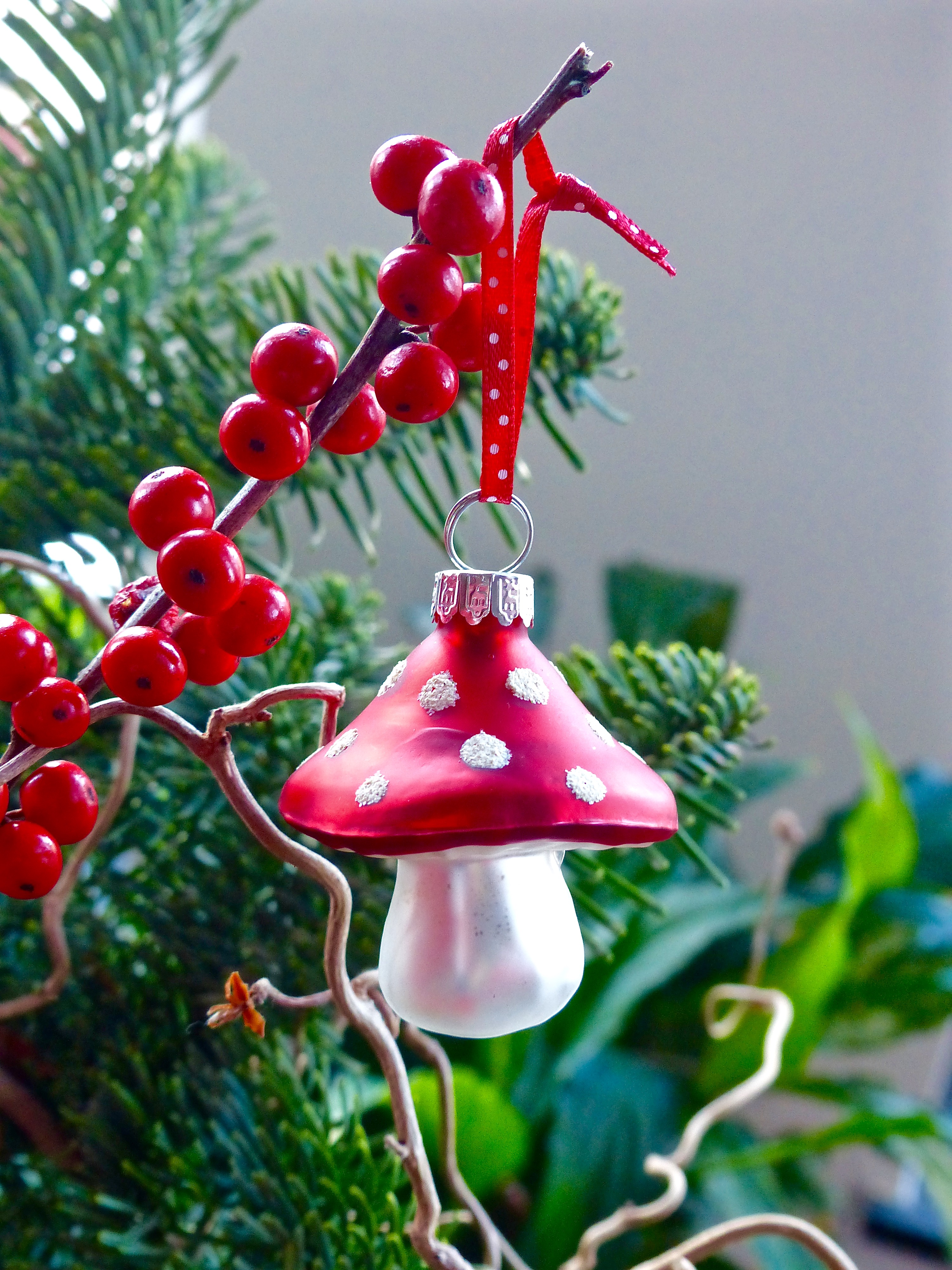 Ilex-Zweig mit einer Weihnachtsdekoration